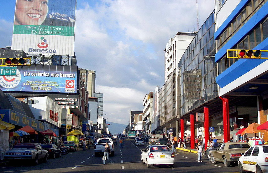 7th Avenue Lugar: San Cristóbal, Venezuela.